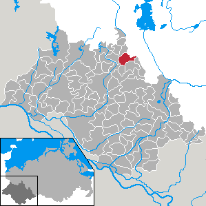 Holthusen in Mecklenburg-Vorpommern - district Ludwigslust